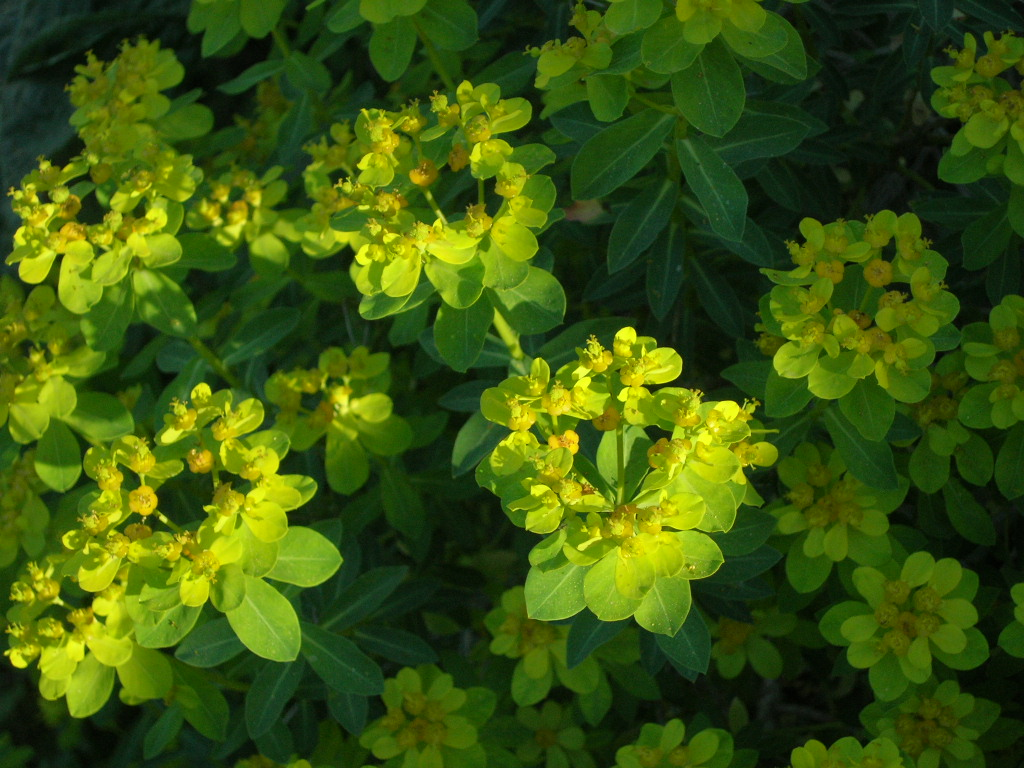 Euphorbia hierosolymitana - חלבלוב מגובשש